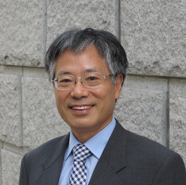 정대영한국은행사진